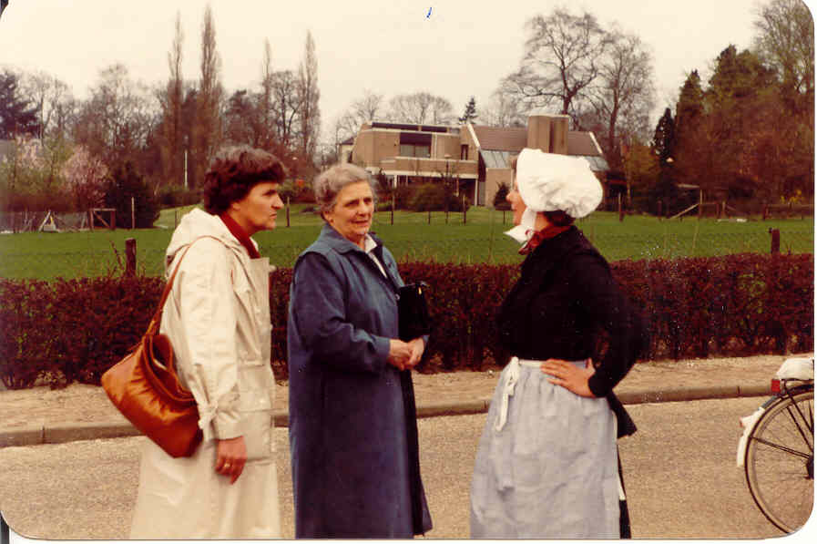 Drie vrouwen ter hoogte van de Trapakkers achter het gemeentehuis in Ede. De drie vrouwen zijn van links naar rechts G.Scholtus-Pijpers, Nennetje Philipina Wiegeraadt-Lam en Ger Elberten-Wiegeraadt. De laatste twee zijn respectievelijk de vrouw en dochter van voormalig wethouder en verzetsman Marten Wiegeraadt.